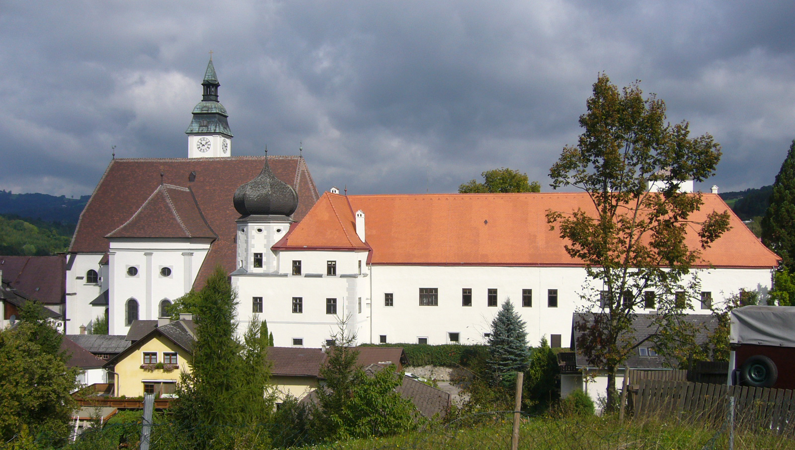 scheibbs